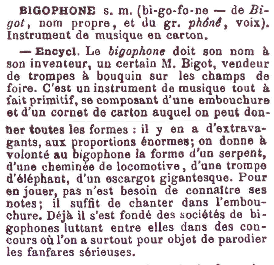 Article Bigophone du Grand Larousse du XIXe siècle